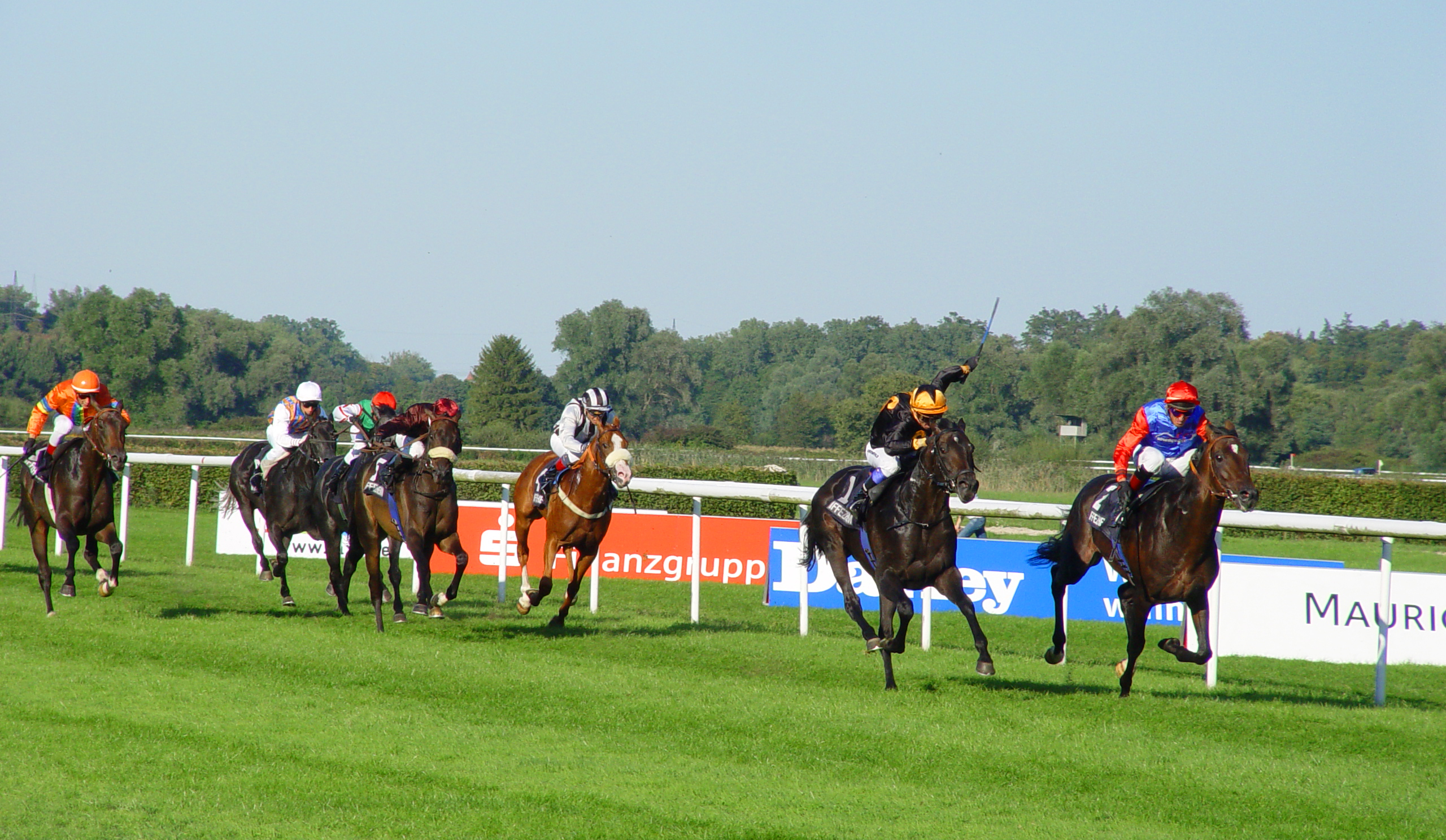 Kurz vor dem Ziel beim Pferderennen in Iffezheim.